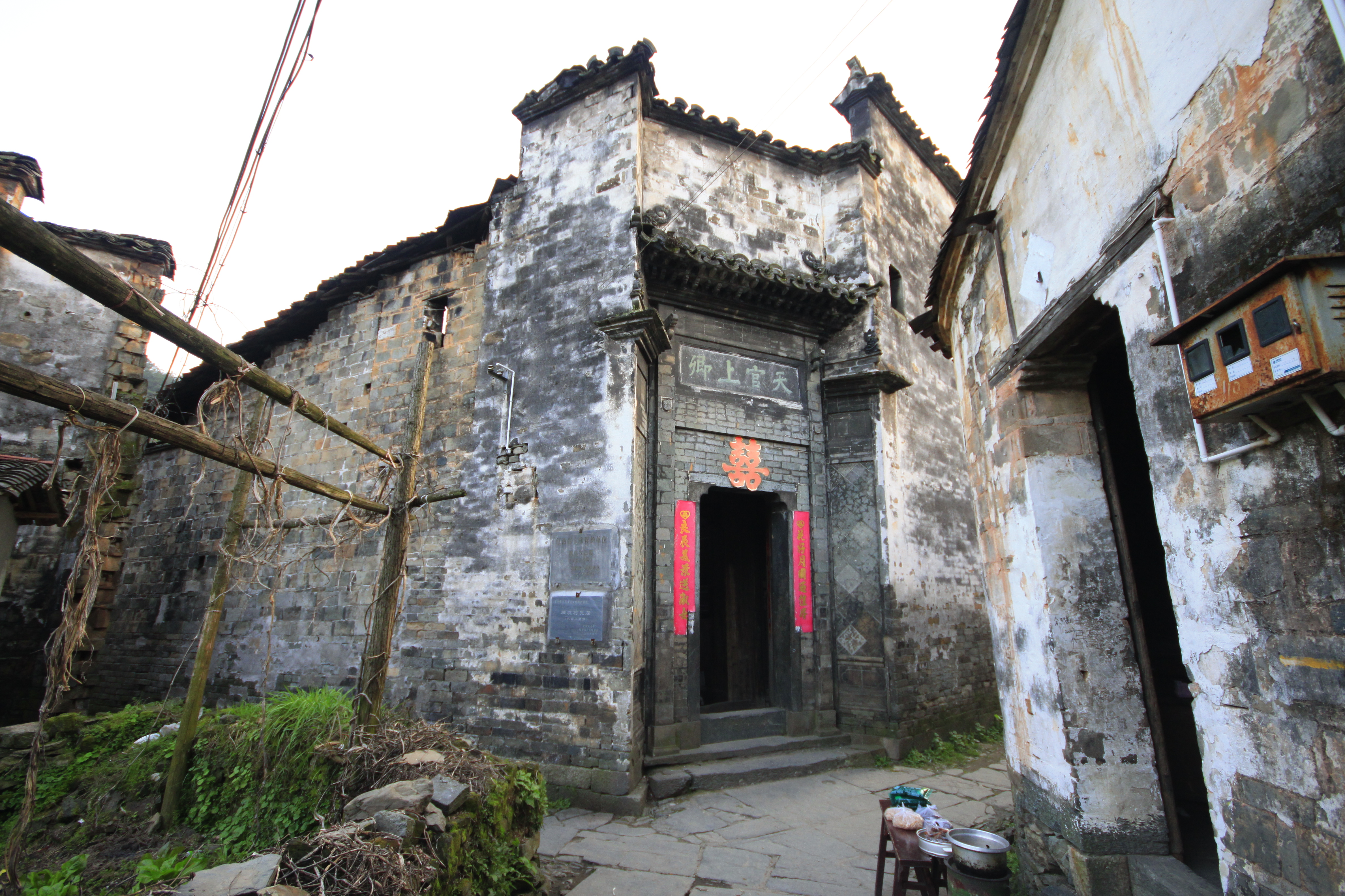 理坑村天官上卿第，位于中国江西省婺源县沱川乡。